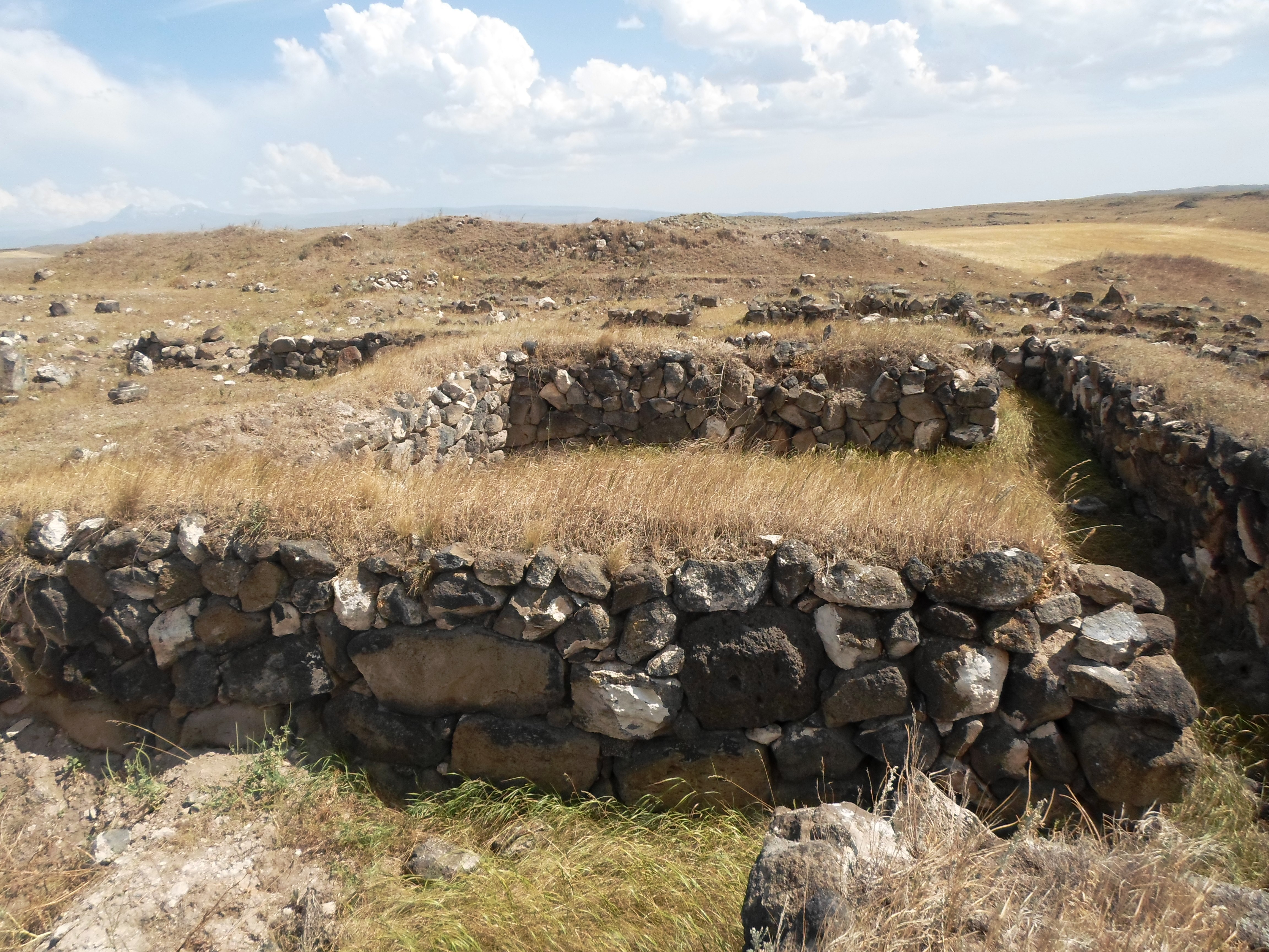 Բենիամինի անտիկ դամբարանադաշտ 27/9